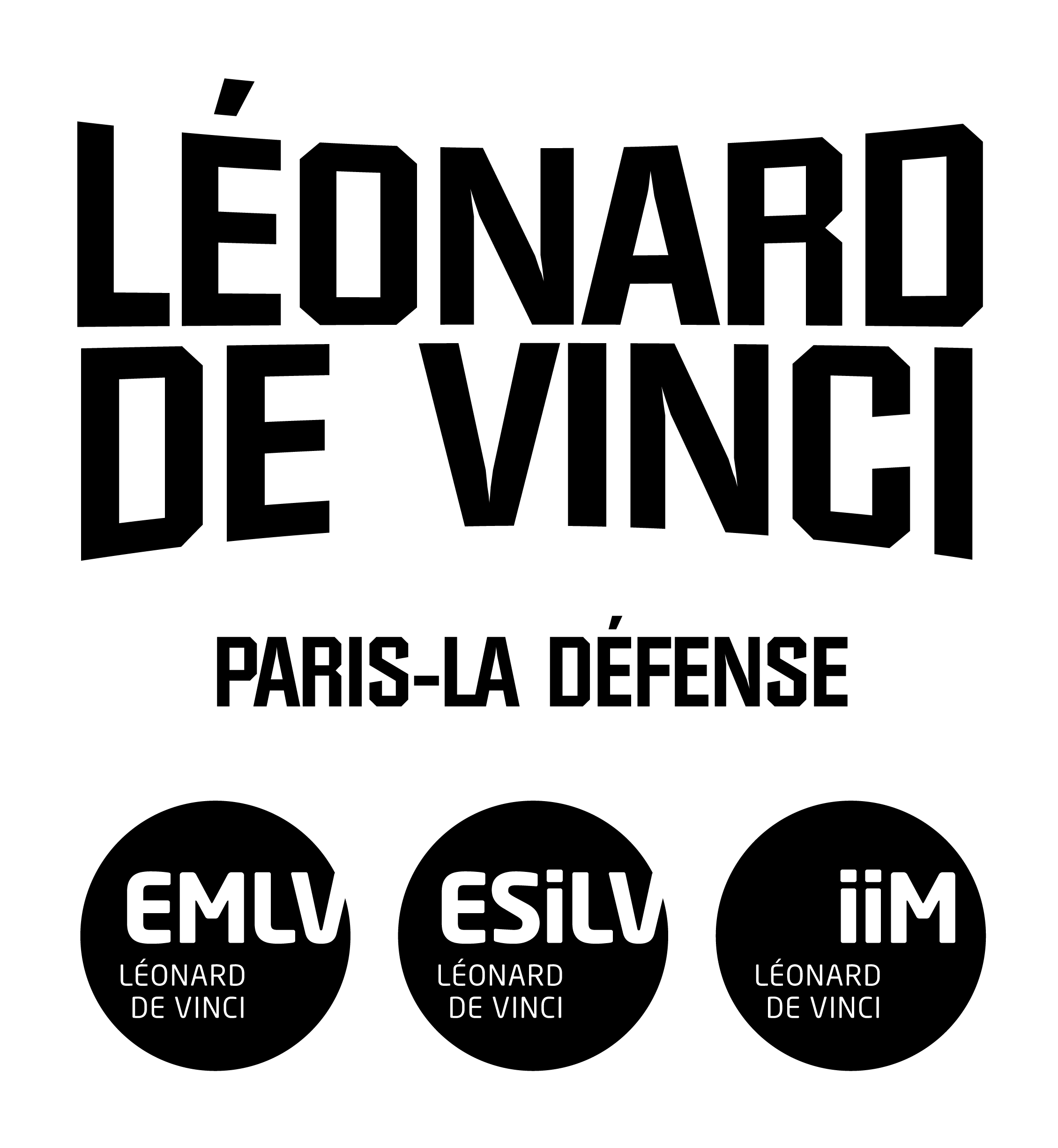 Logo Pôle Universitaire Léonard de Vinci